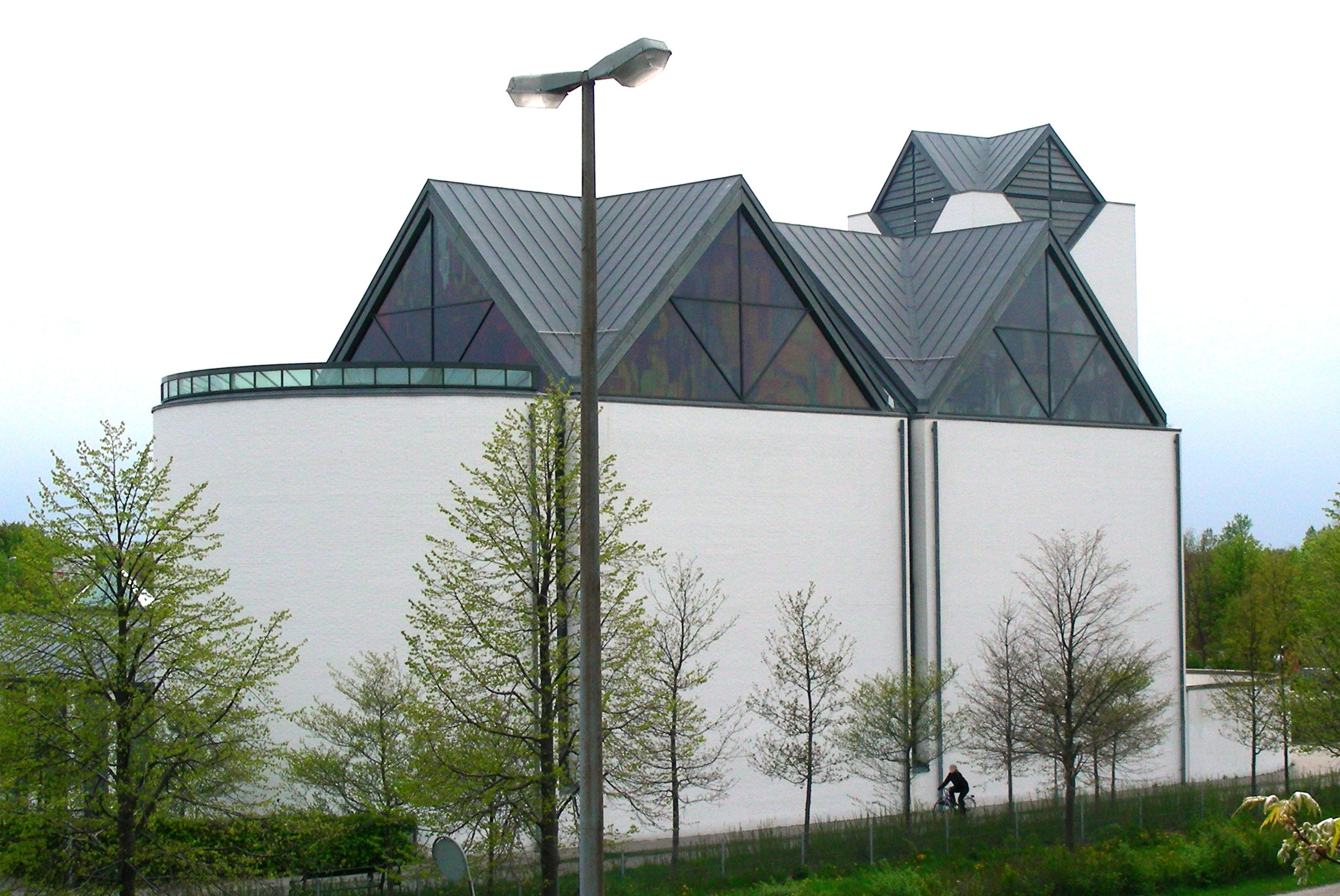 Vejleå Kirke, Ishøj, Denmark. Seen from the north.